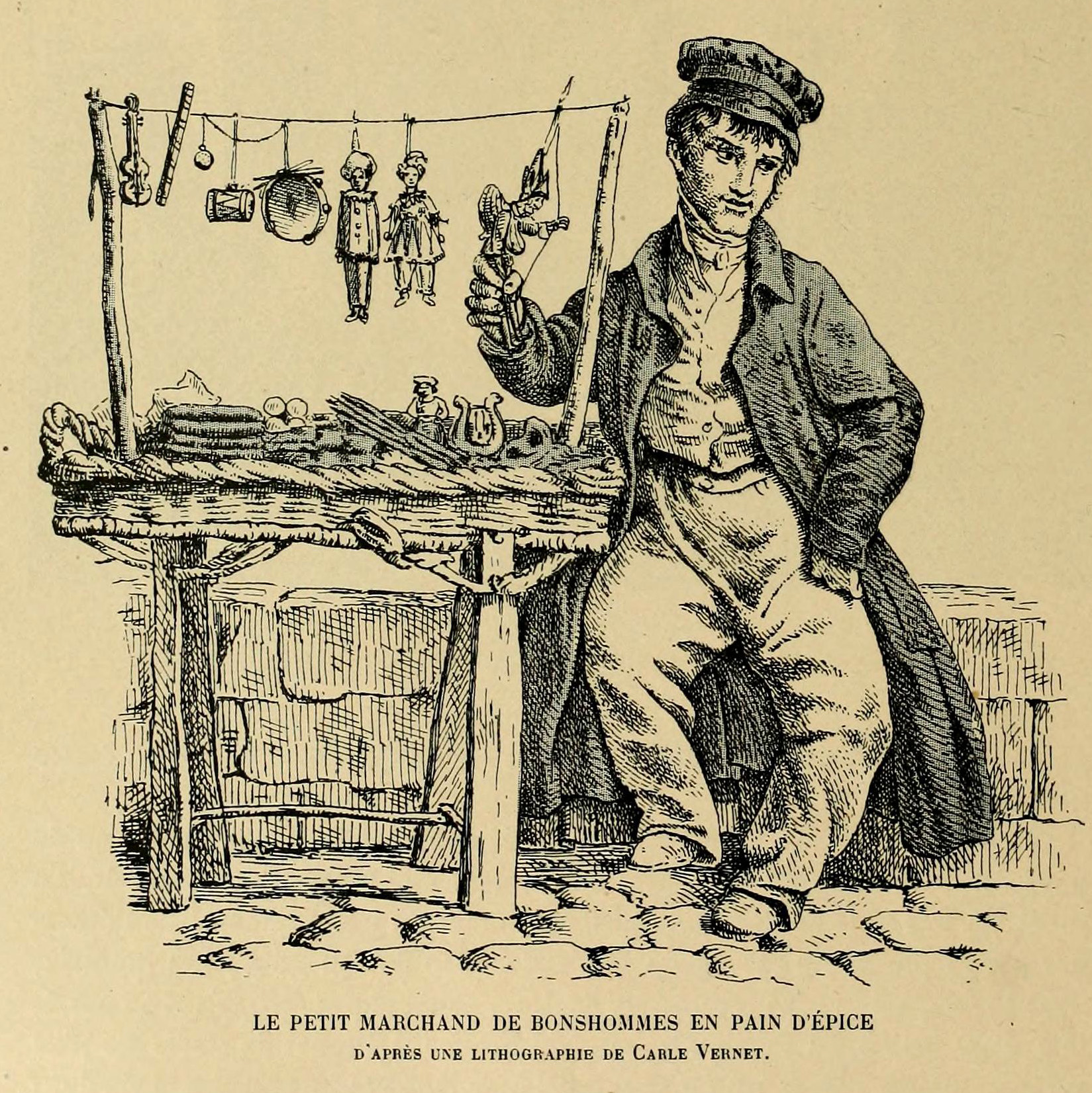 Illustration from Histoire des jouets